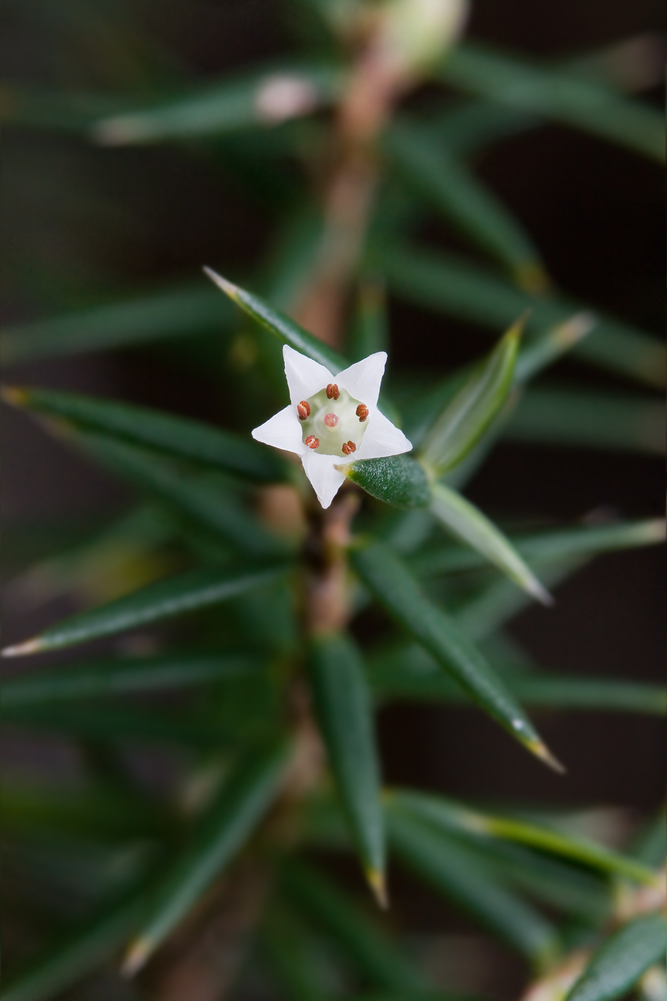 Leptecophylla juniperina, Cape Raoul, Tasman Peninsula, Tasmania, Australia